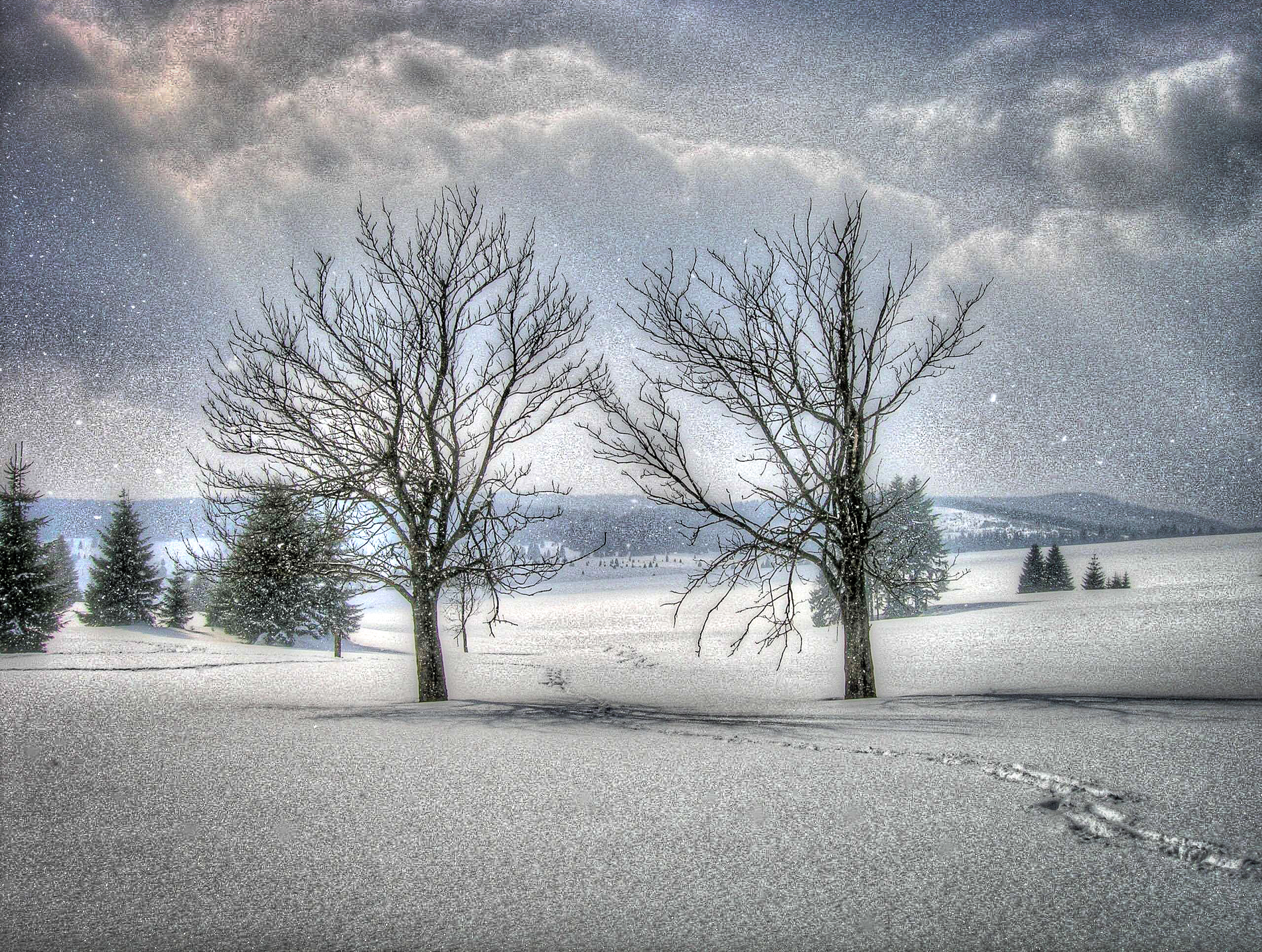 Cover hudebního projektu ZIMA vysoké rozlišení